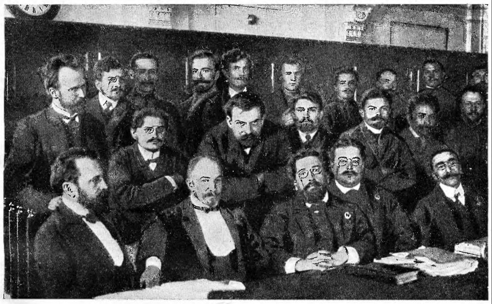 Суд над Советом рабочих депутатов Петербурга (1906); Троцкий сидит второй слева